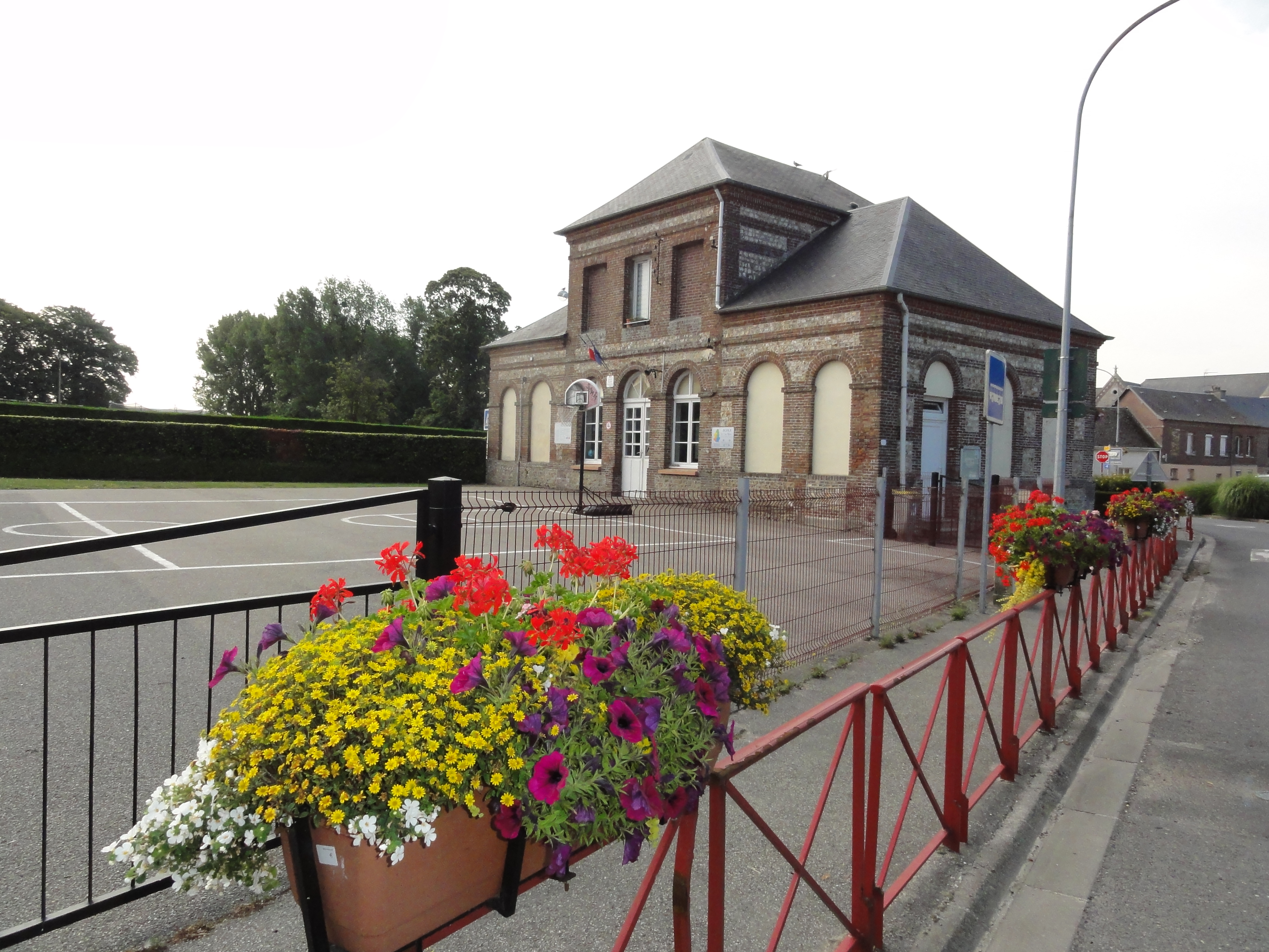 Rouville (Seine-Mar.) école